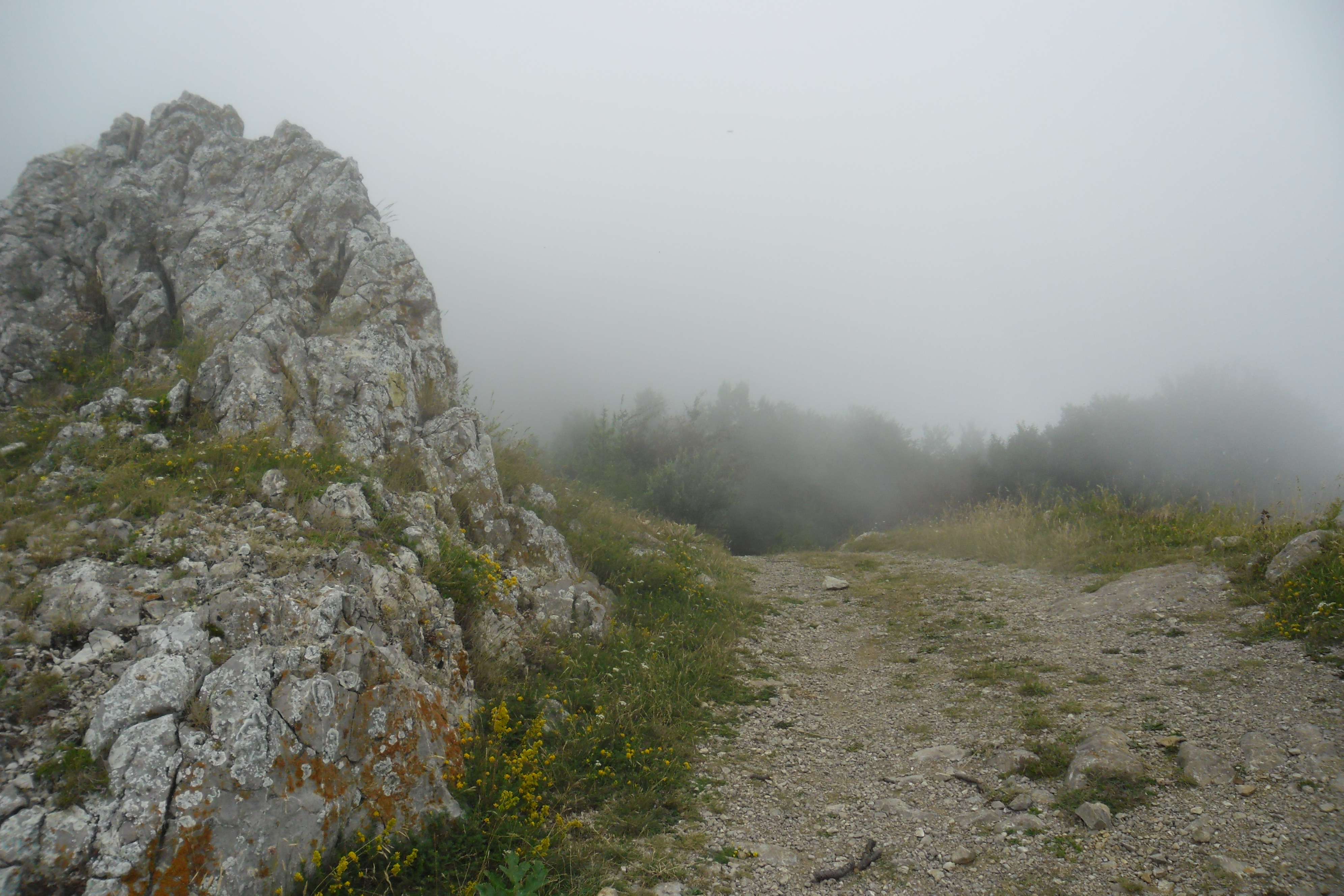 Фото